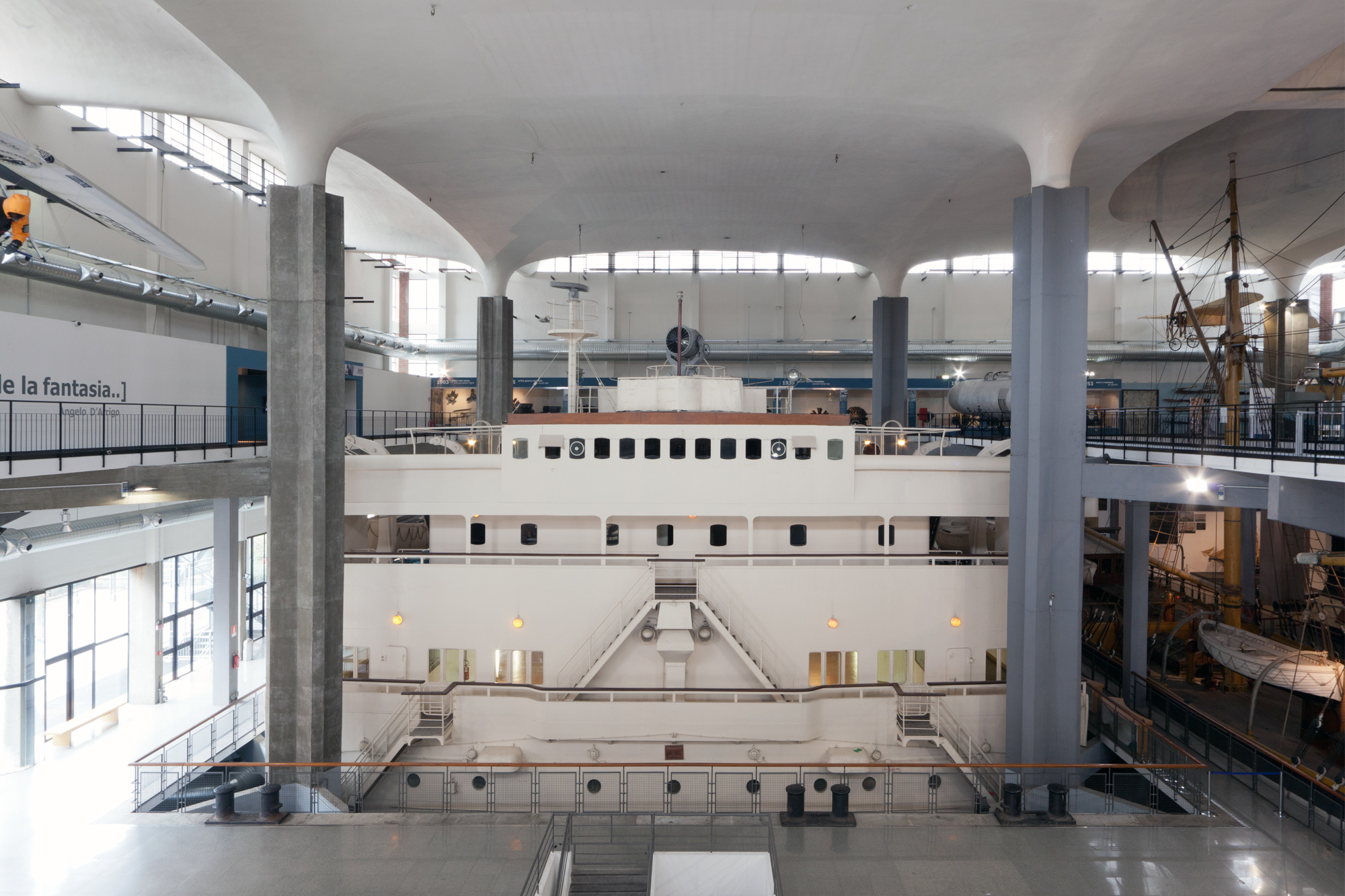 Ponte di comando del transatlantico "Conte Biancamano", esposto nel padiglione aeronavale del Museo nazionale della scienza e della tecnologia Leonardo da Vinci, Milano.